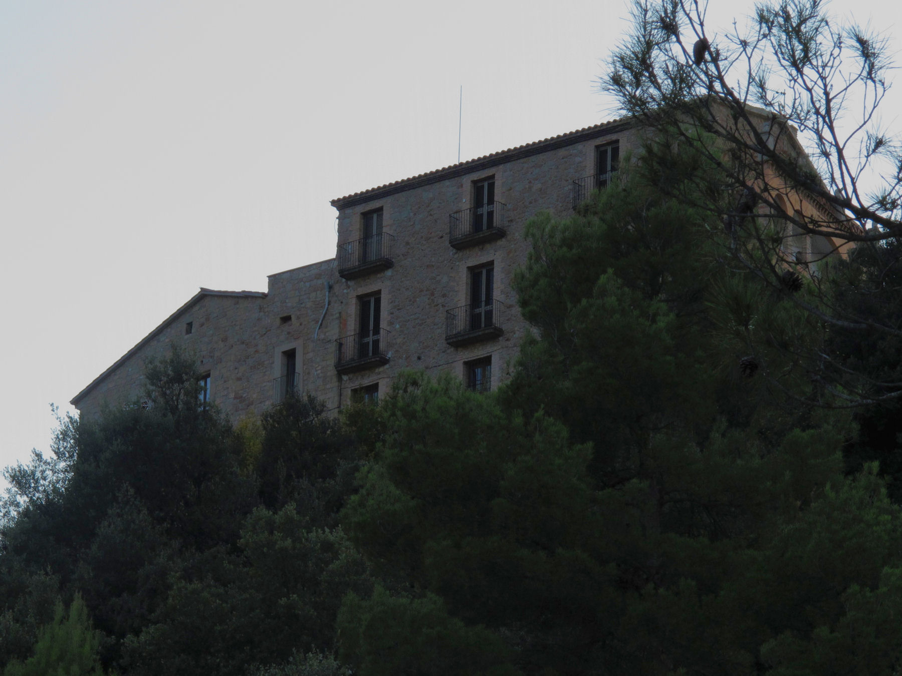 Castell de Guardiola - Sant Salvador de Guardiola